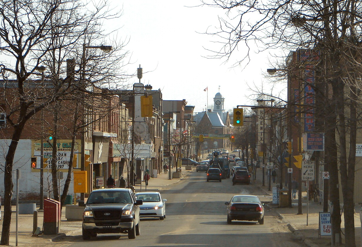 Pembroke Street, Pembroke, Ontario, Canada